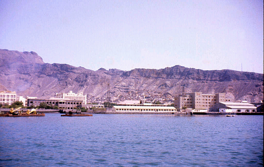 Aden 1960Aden 1960 3